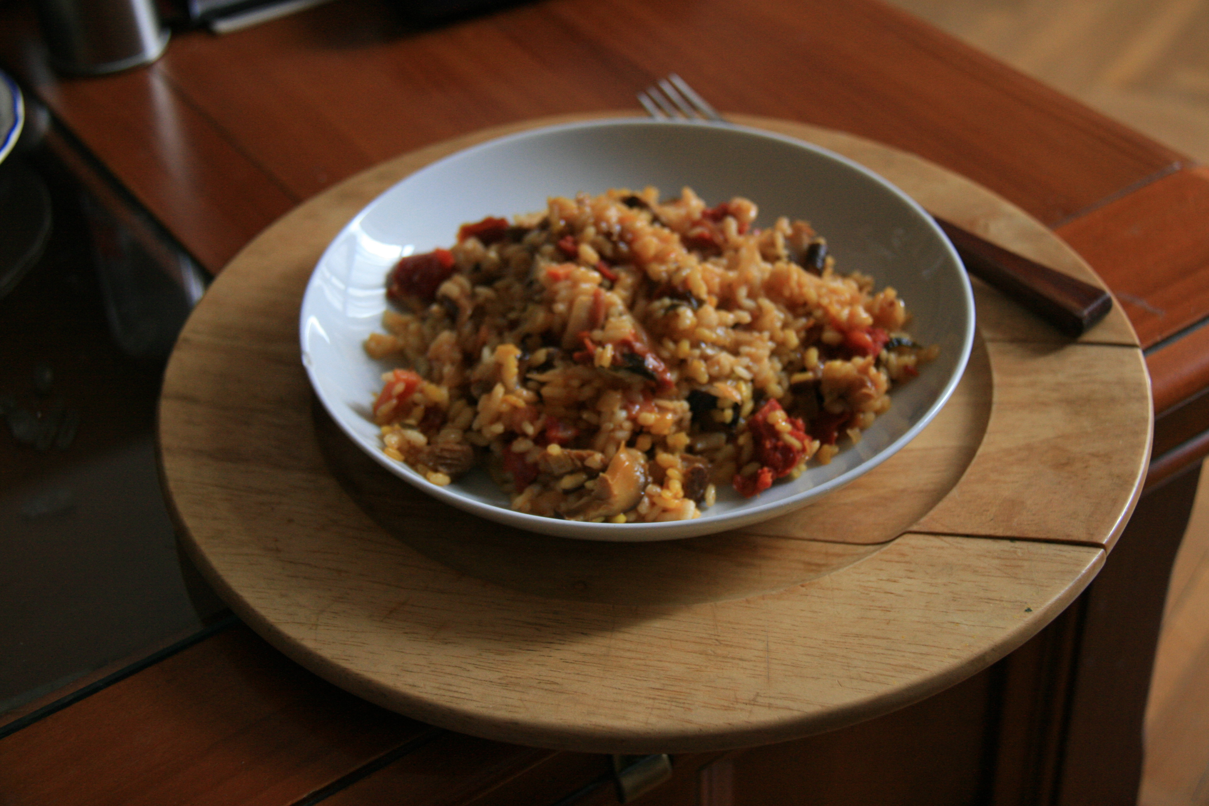 Arroz a la milanesa